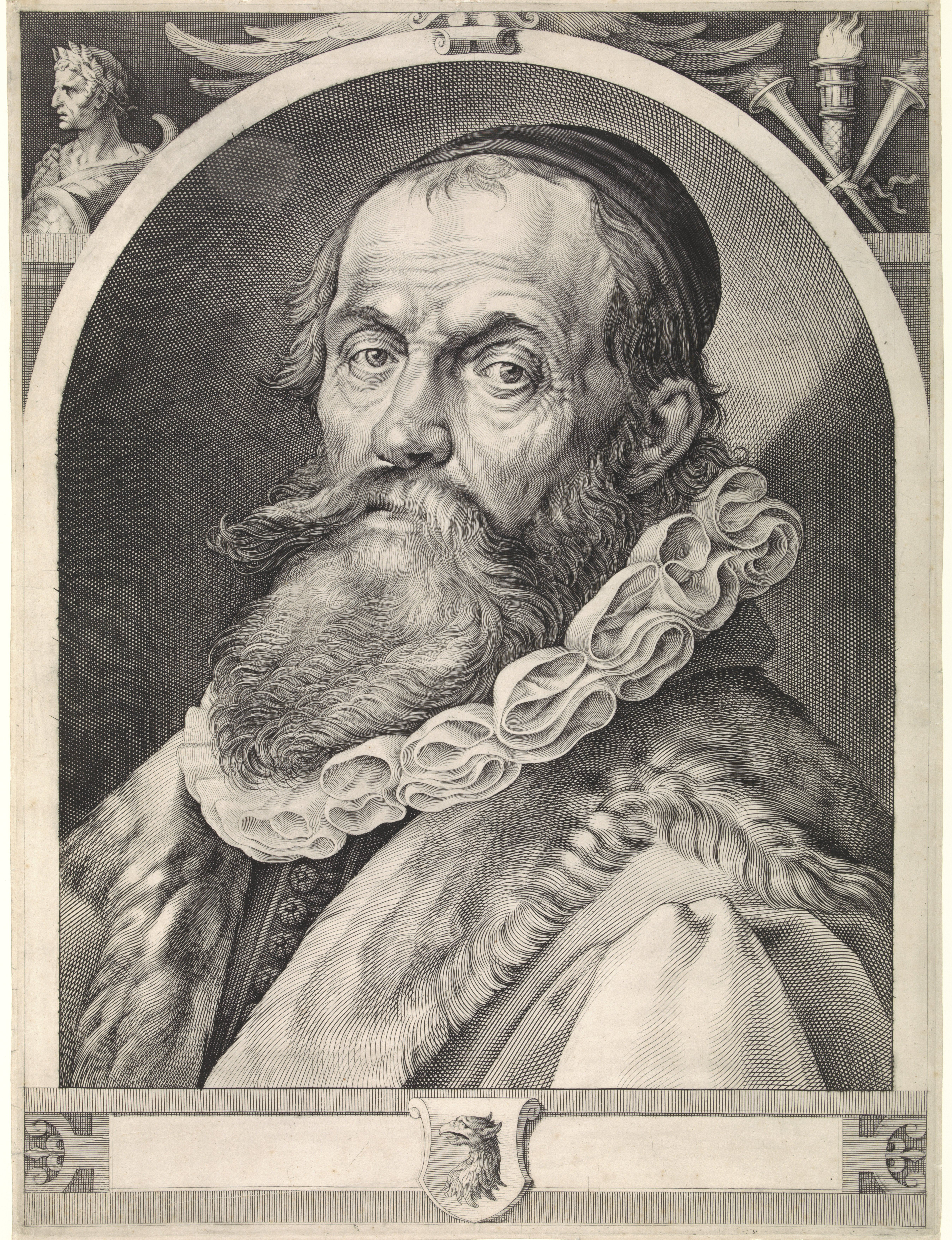 IdentificatieTitel(s): Portret van Hendrick GoltziusObjecttype: prent Objectnummer: RP-P-OB-27.328Catalogusreferentie: New Hollstein Dutch R24-2(3)Opmerking: MathamOpschriften / Merken: verzamelaarsmerk, verso linksonder, gestempeld: Lugt 240VervaardigingVervaardiger: prentmaker: Jan Harmensz. Muller (toegeschreven aan)prentmaker: Jacob Matham (verworpen toeschrijving)naar schilderij van: Hendrick Goltzius (mogelijk)Datering: 1617 - 1620Fysieke kenmerken: gravureMateriaal: papier Techniek: graveren (drukprocedé)Afmetingen: plaatrand: h 577 mm × b 430 mmOnderwerpWie: De Witte SterVerwerving en rechtenVerwerving: overdracht van beheer 1816Copyright: Publiek domein